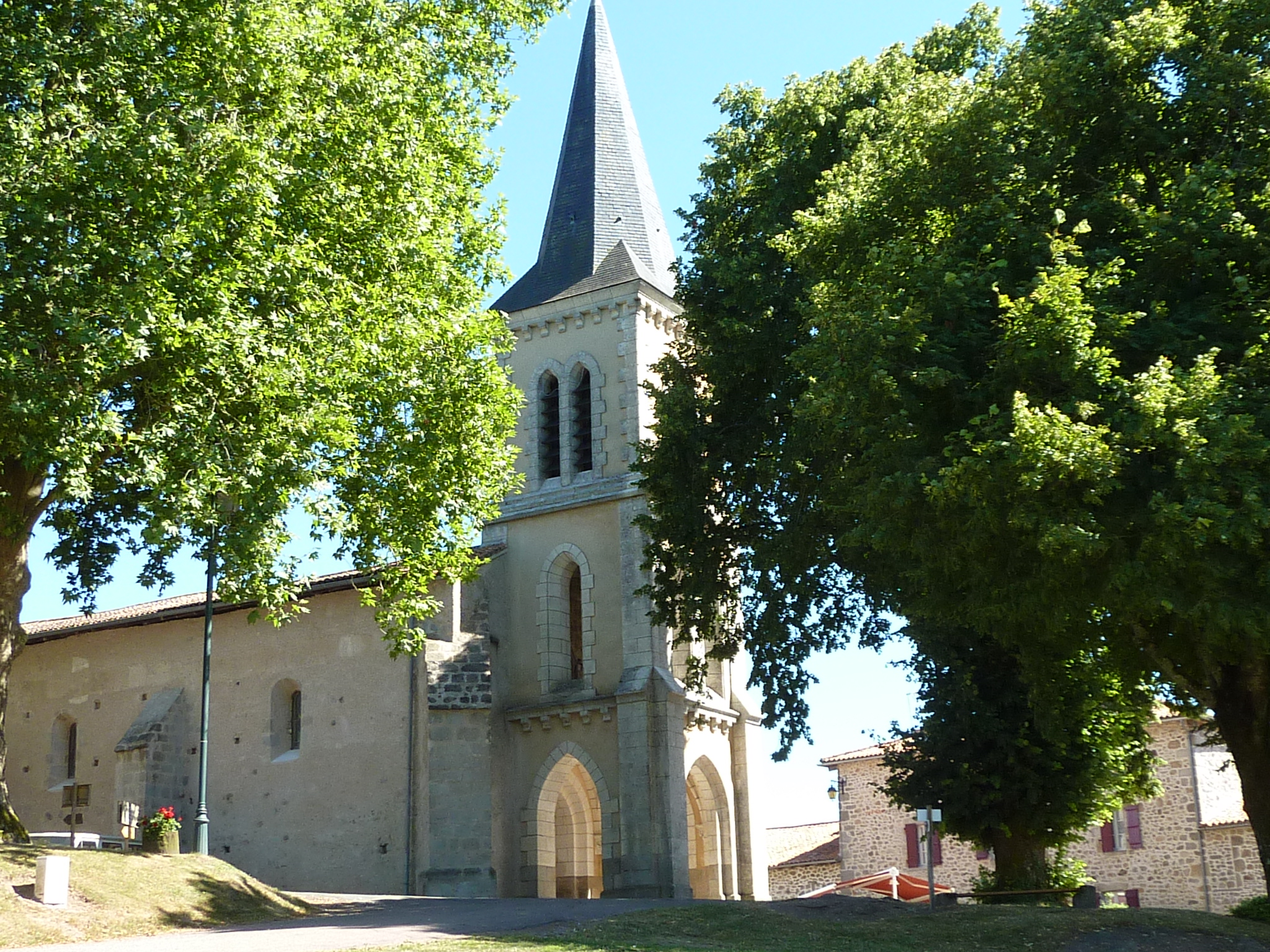 église de Saint-Barthélemy-de-Bussière